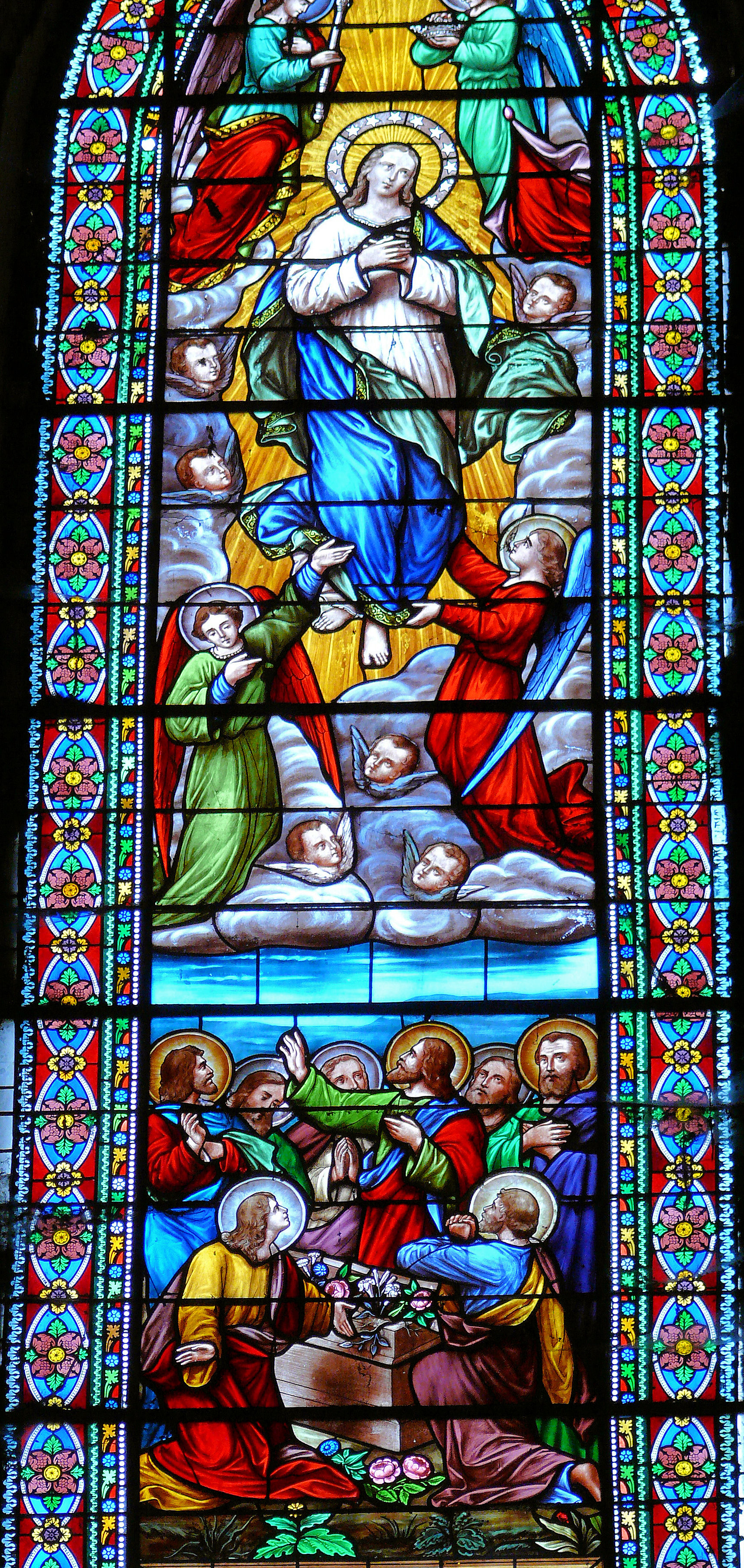 Paunat - Église Saint-Martial - Choeur - Vitrail de l'Assomption de la Vierge